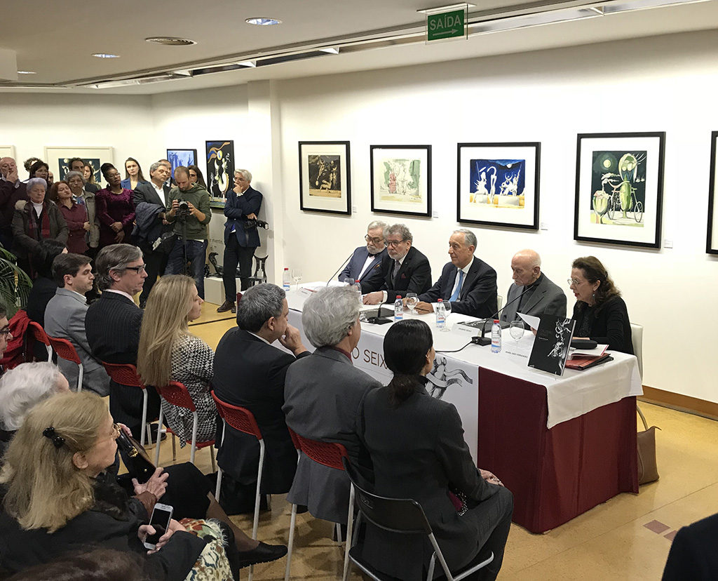 Homenagem a Cruzeiro Seixas com a presença (a contar da esquerda) Tomás Paredes (presidente da Associção Espanhola de Críticos de Arte (AECA)), António Prates (galerista e fundador do CPS) Marcelo Rebelo de Sousa (Presidente da República) Cruzeiro Seixas, Maria João Fernandes (crítica de arte da Associação Internacional de Críticos de Arte).